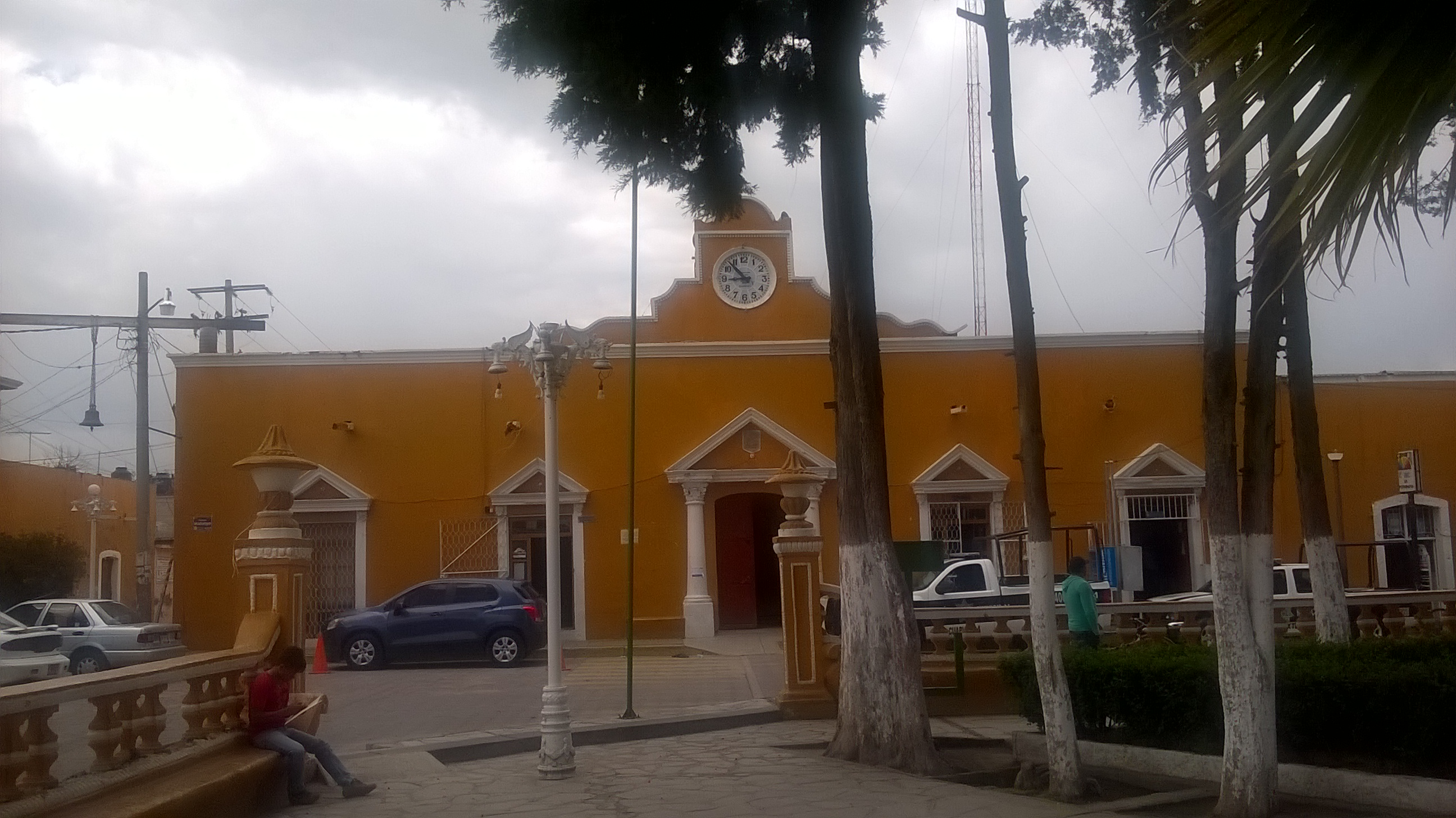 Presidencia municipal de Cuapiaxtla, Tlaxcala